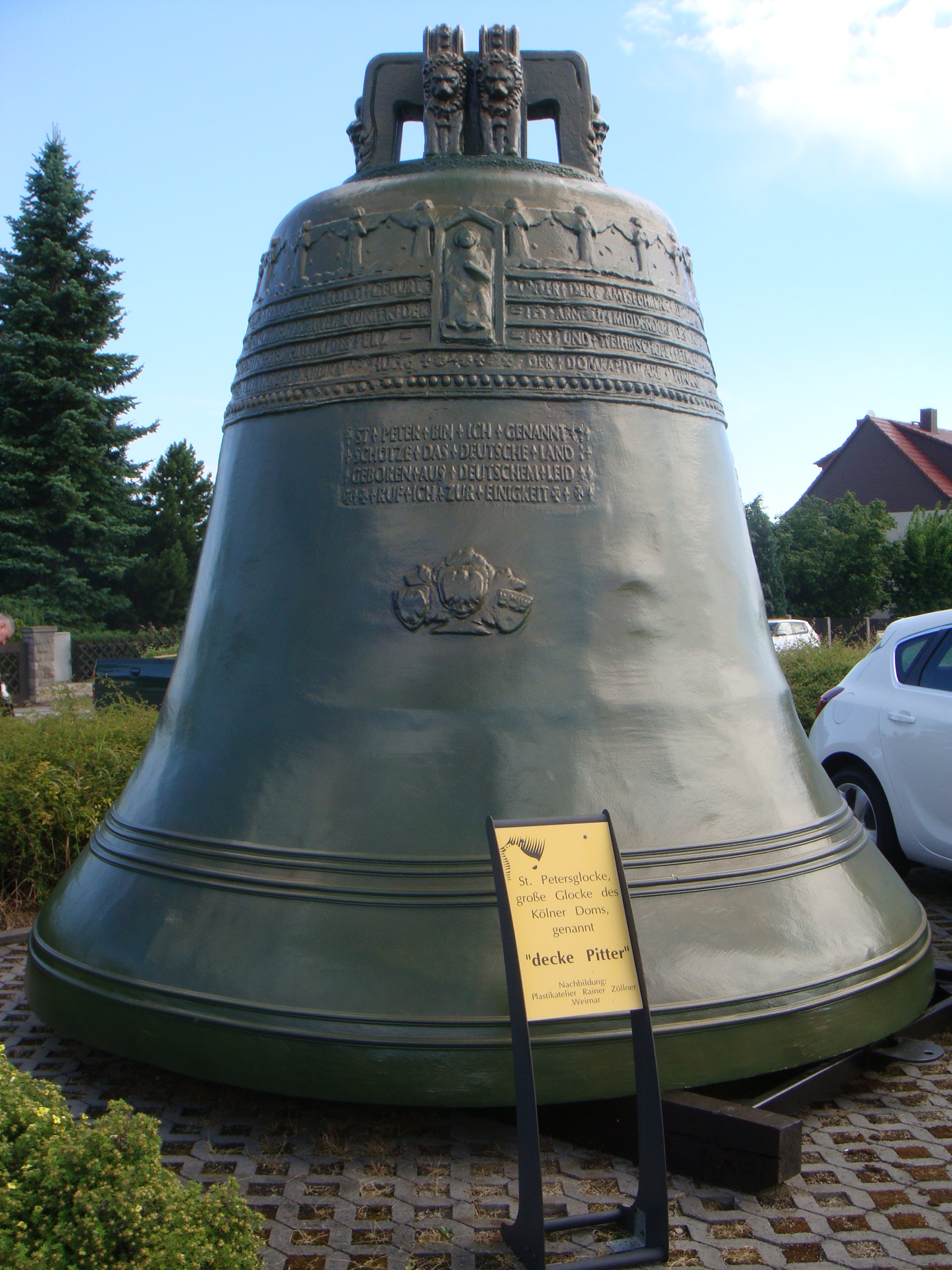 Nachbildung des "Decken Pitter" am Autohaus Matt von Apolda. Die Flankenkontur ("Rippe") weist nur eine entfernte Ähnlichkeit mit dem Original auf.